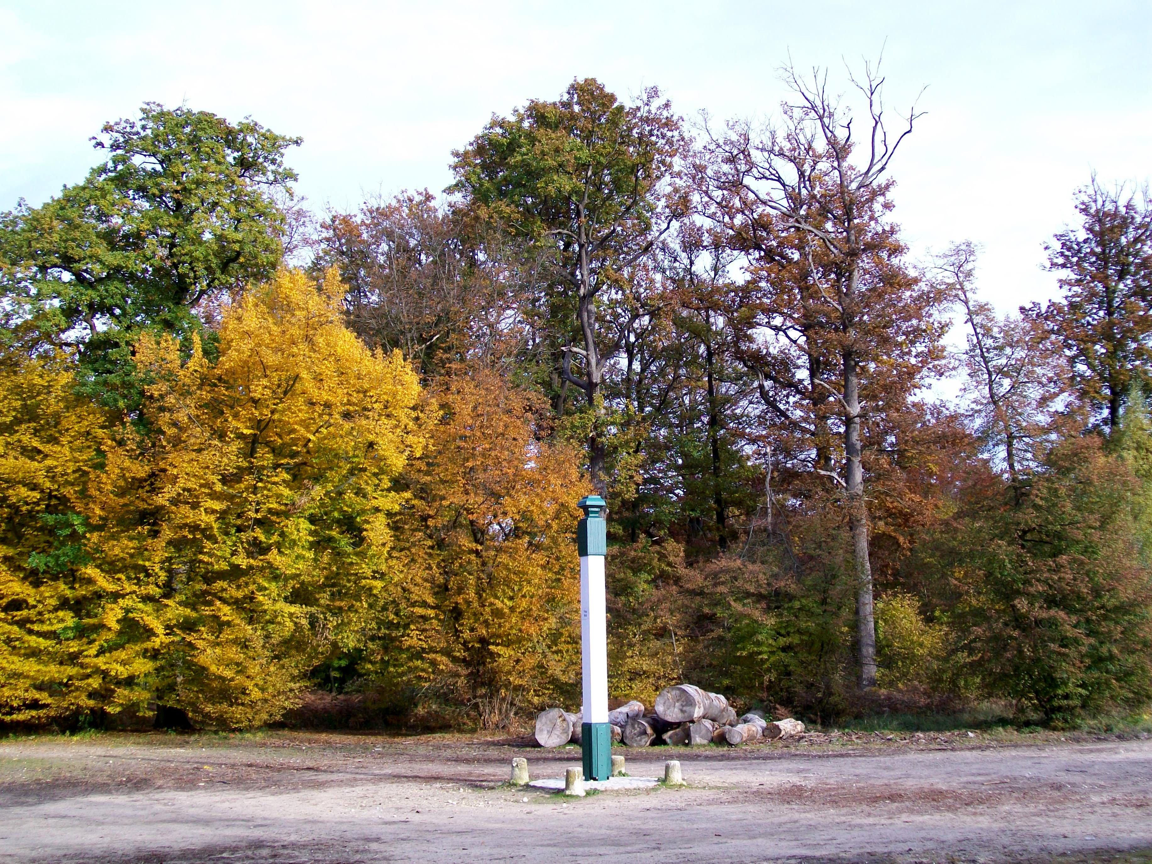 Le poteau Nibert dans la forêt de Coye, massif annexe de la forêt de Chantilly ; point de rencontre entre les trois communes de Luzarches (95), Orry-la-Ville (60) et La Chapelle-en-Serval (60).